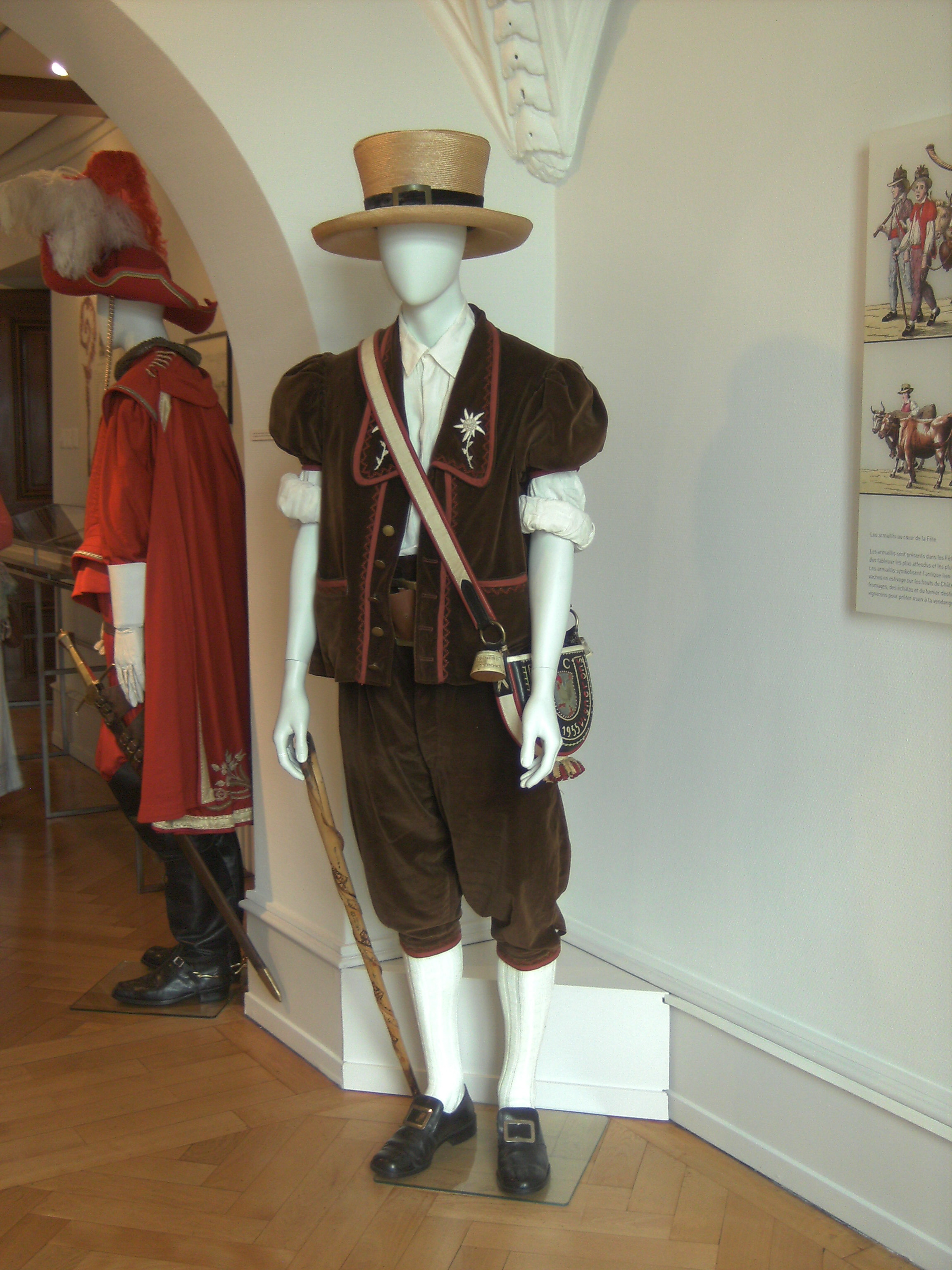 Vevey (Suisse) - musée de la Confrérie des Vignerons - Costume du soliste du Ranz des vaches (Armailli) de la fête des vignerons de 1955.